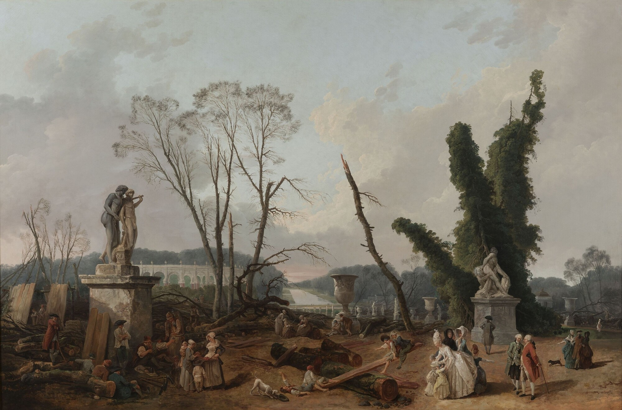 L'entrée du Tapis vert. Tableau exposé au salon de 1777 avec une semblable nommée "vues des jardins de Versailles, dans le temps qu'on abattait les arbres". Œuvre commandée par Louis XVI en 1775 pour célébrer les grands travaux réalisés cette année dans le parc. Dimensions : 124 x 191 cm. Cadre : 148 x 212 x 9 cm. Matière et technique : huile sur toile.